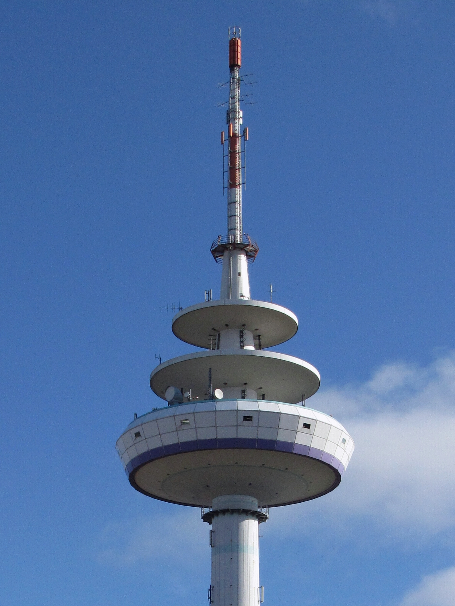 Fernmeldeturm Schleswig FMT Plattformen für Technik, Sendeanlagen, Übertragungsanlagen und Antennen sowie Antennen-Nadel Foto 2012 Wolfgang Pehlemann IMG_4475